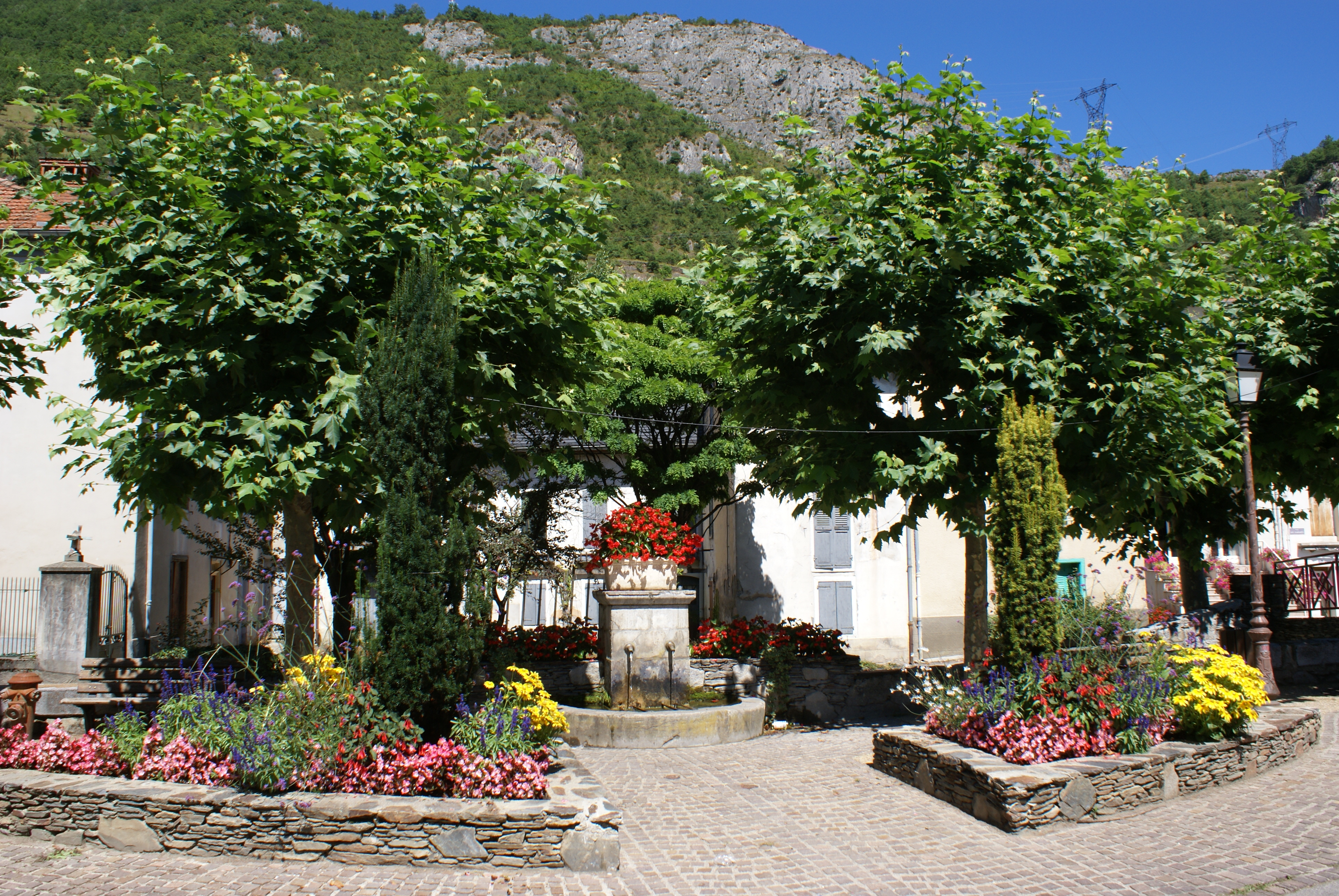 Auzat (Ariège, France). Village fleuri